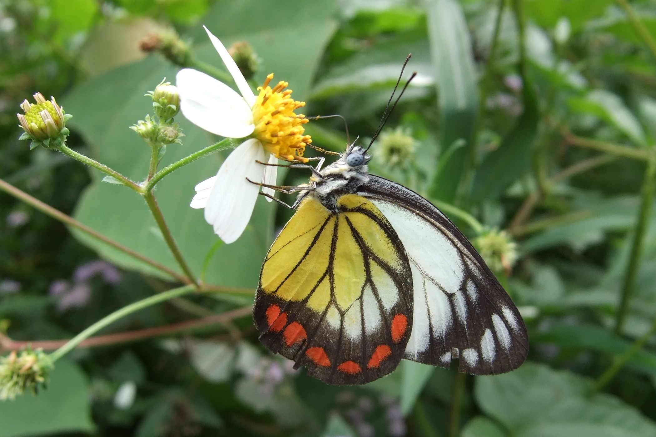 Delias hyparete; 紅紋粉蝶; Âng-bûn-hún-tia̍p